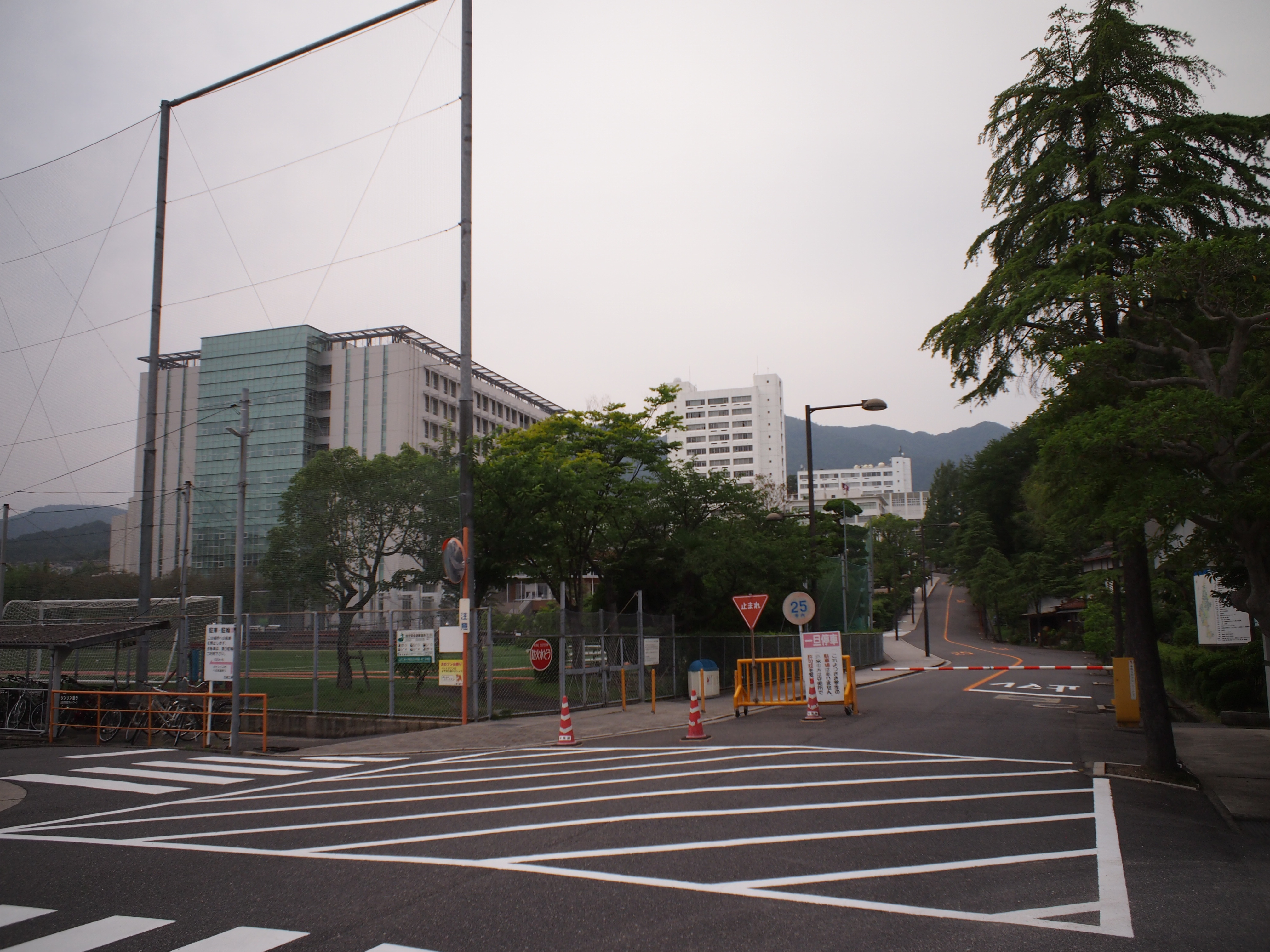 広島工業大学